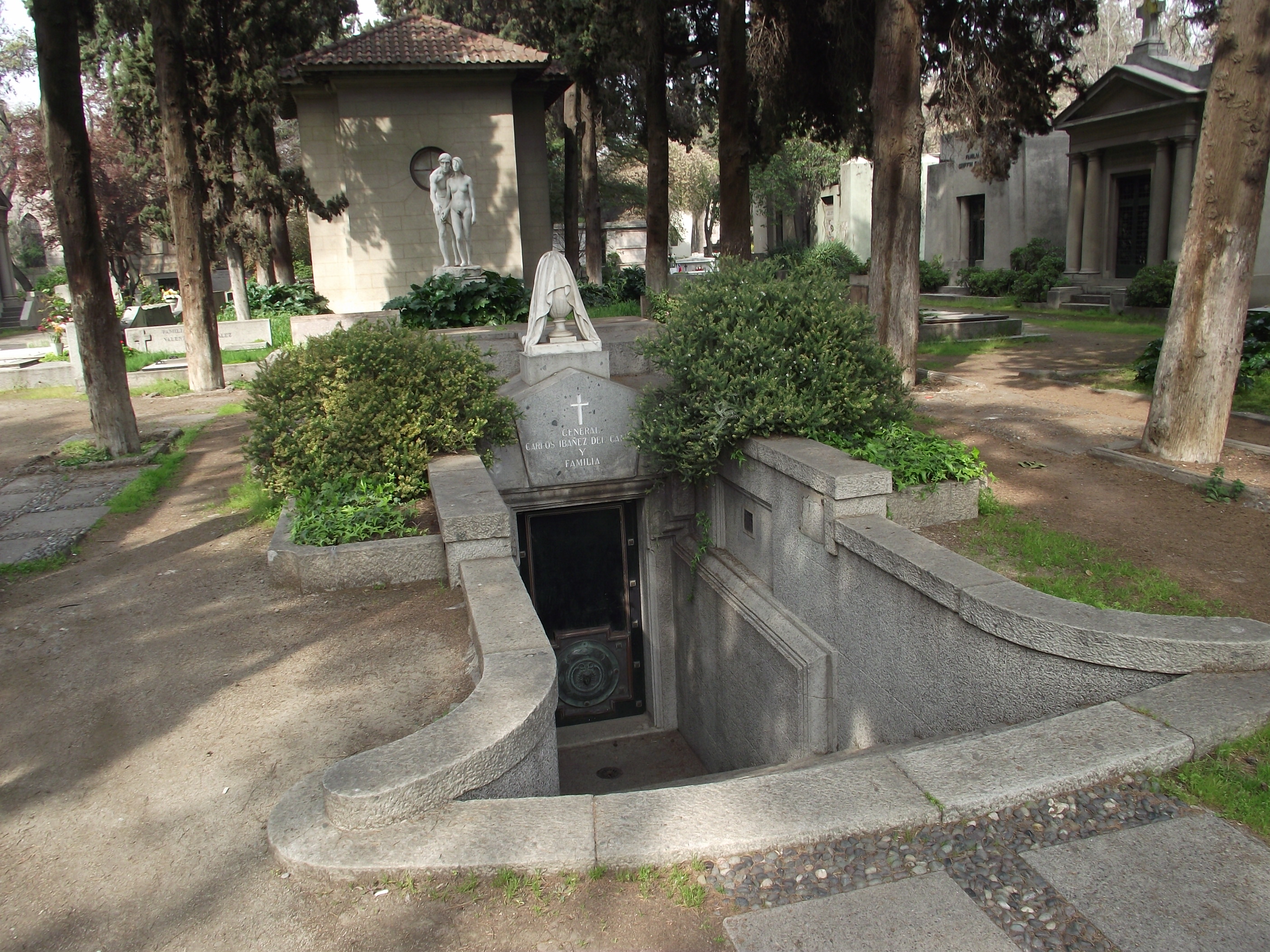 Mausoleo del ex-Presidente de Chile Carlos Ibáñez del Campo.